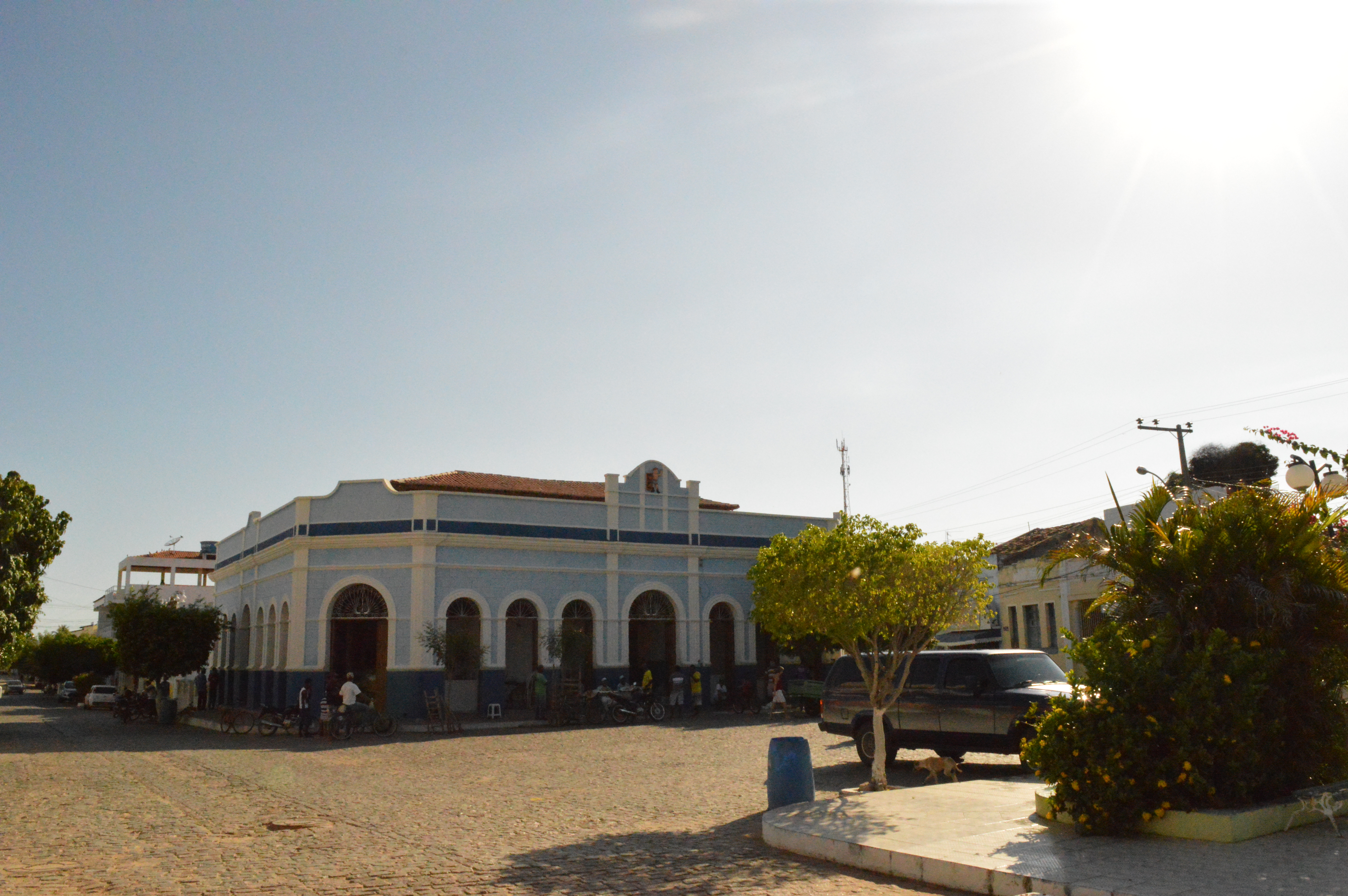 Vista do Mercado Municipal de Paratinga. Foto de 16 de janeiro de 2017.